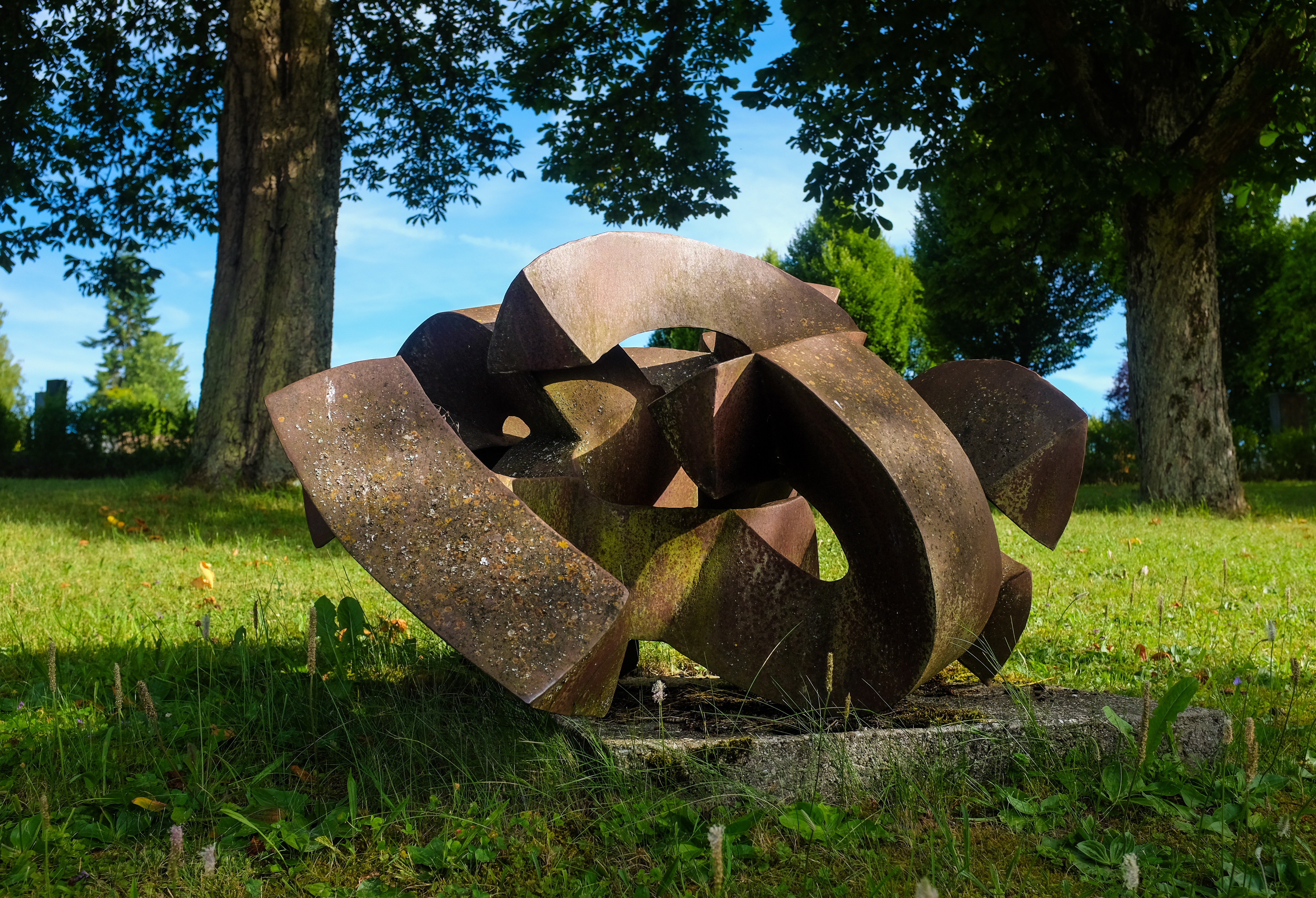 Skulptur (Jörg Bach) am Friedhof, Deißlingen, Landkreis Rottweil, Baden-Württemberg, Deutschland